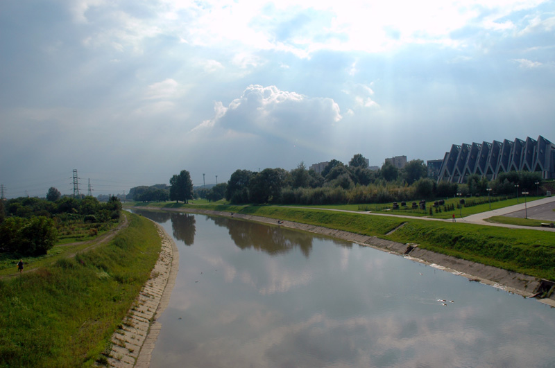 Wislok River - Rzeszów